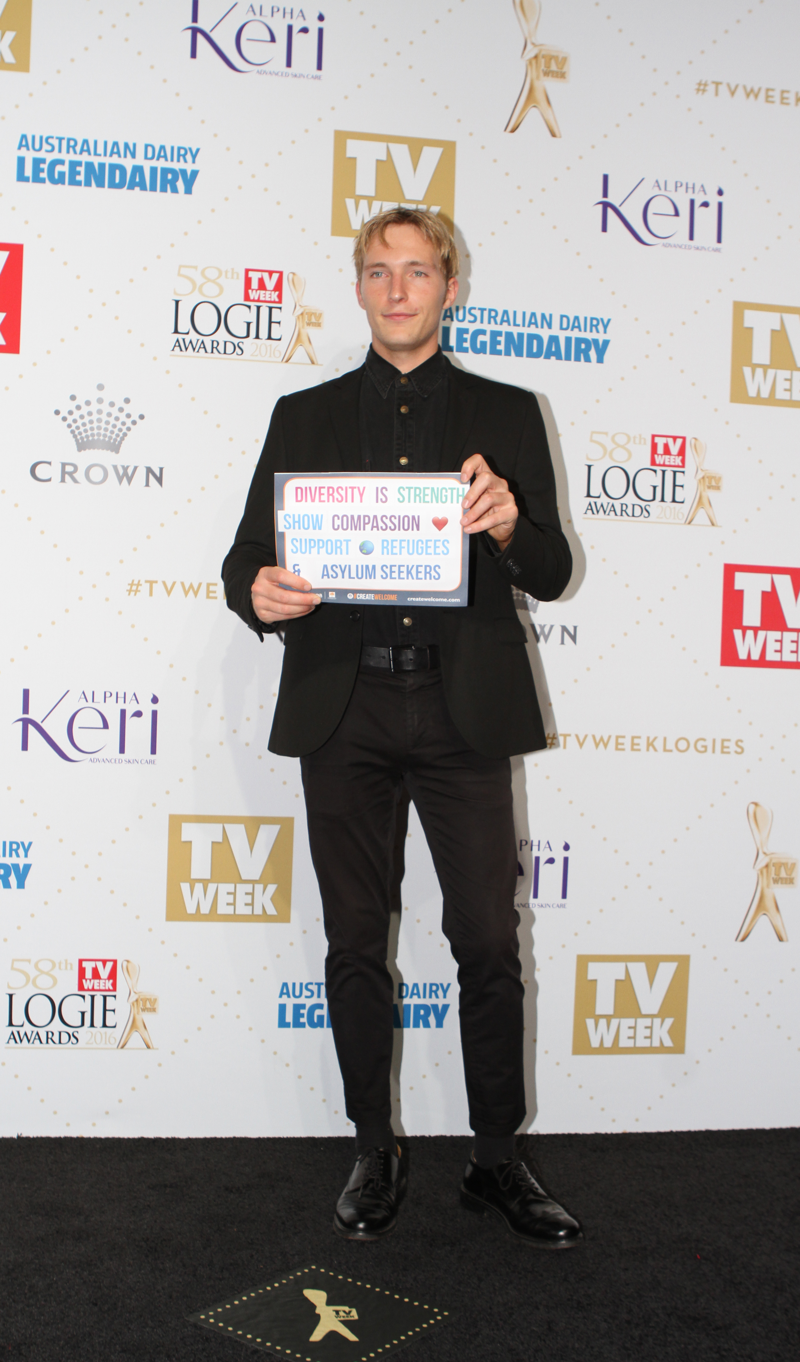 Sean Keenan 2016 TV Week Logie Awards